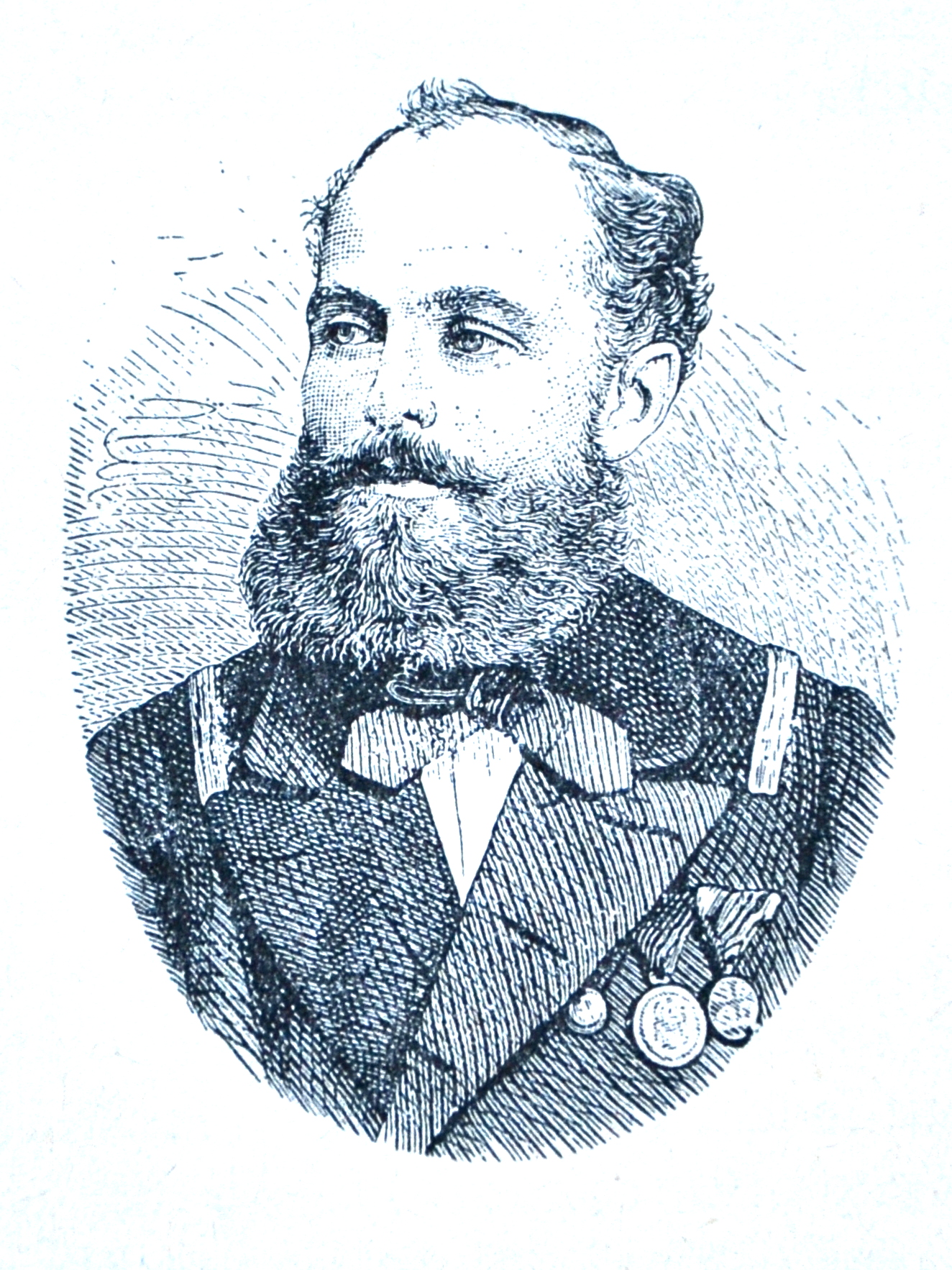 Gustav Brosch